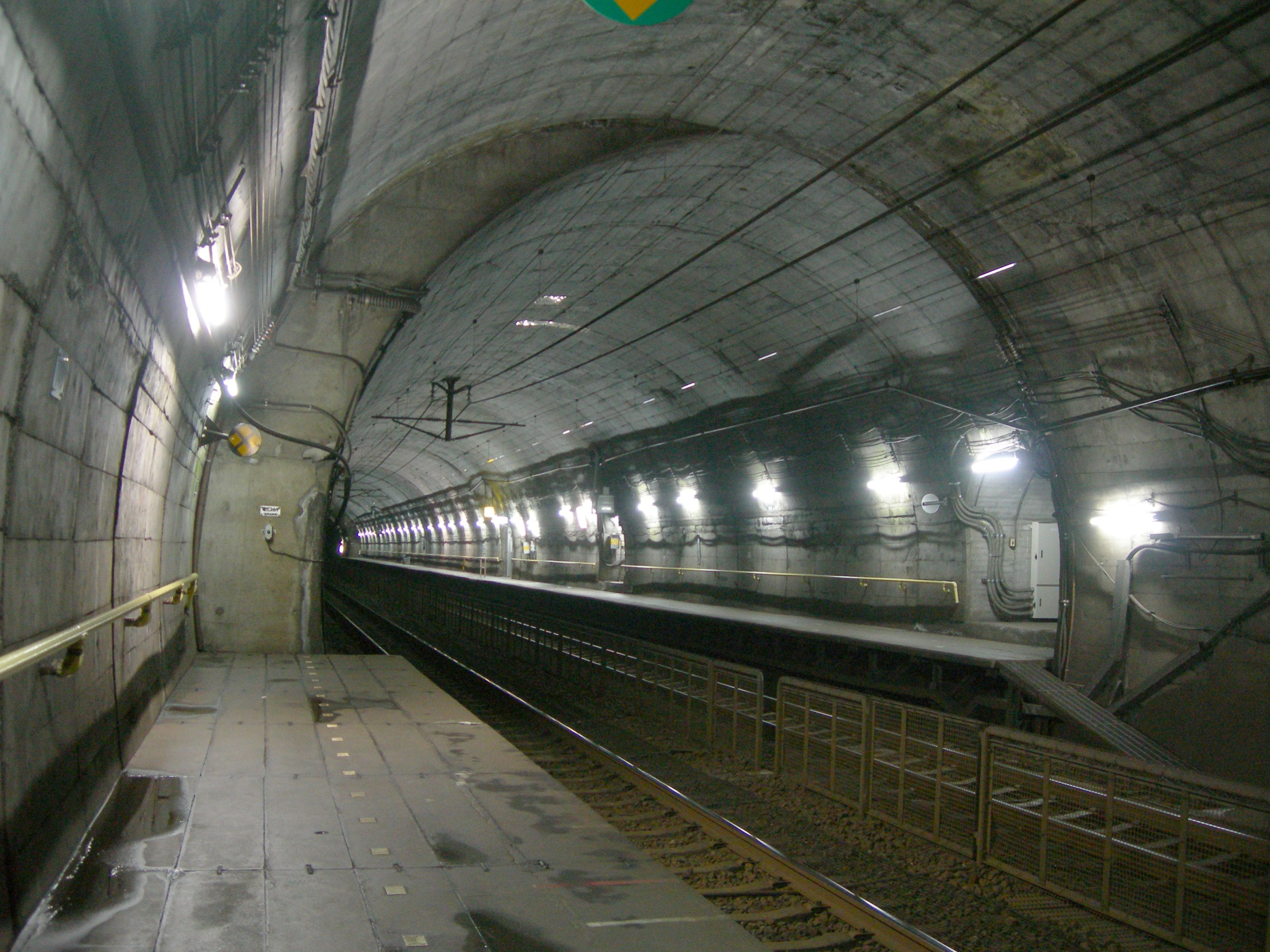 筒石駅の下りホームのを上りホームから撮る